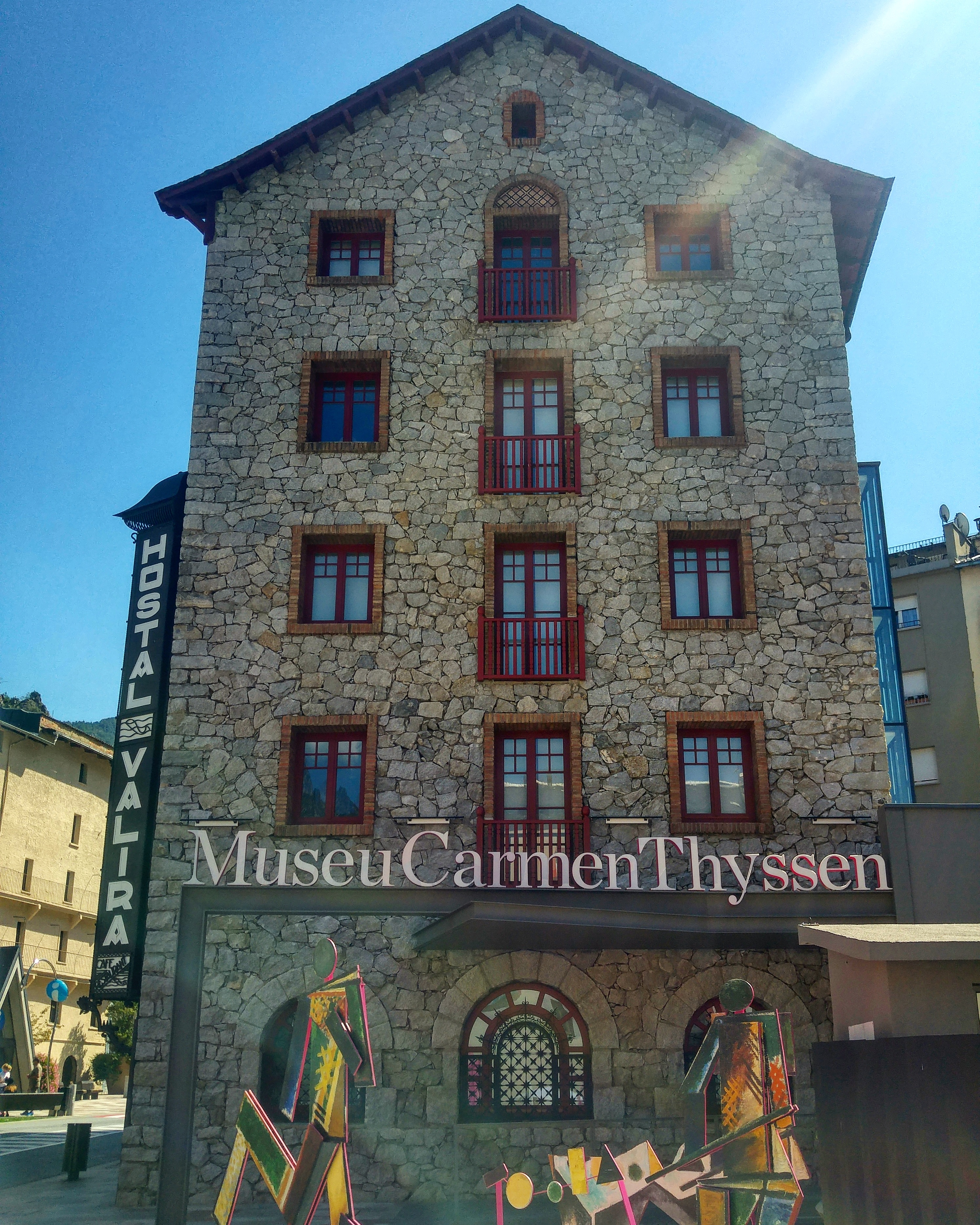 Hostal Valira a Escaldes-Engordany, seu del museu Carmen Thyssen des de 2017